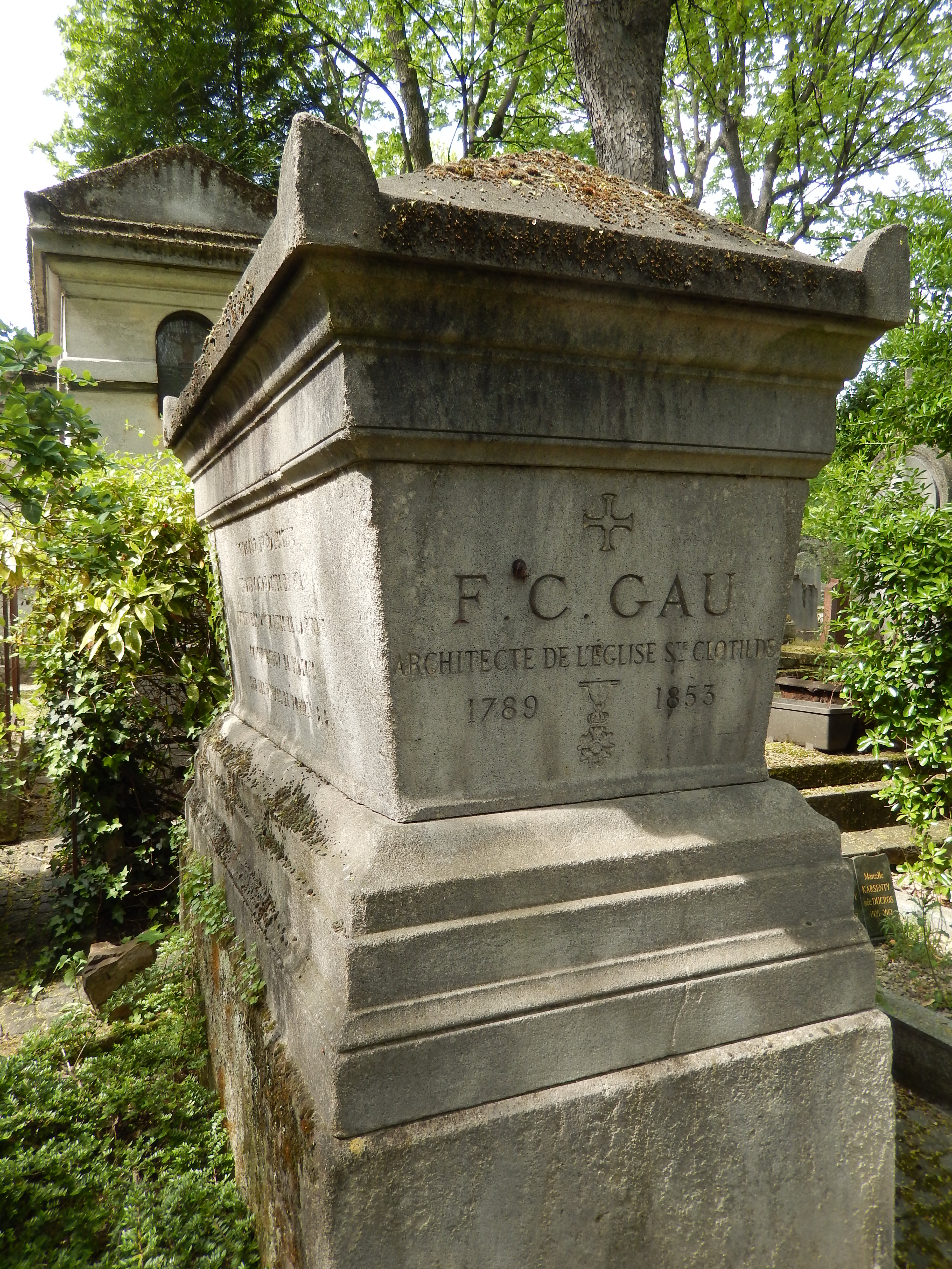 Tombe de François-Christian Gau (cimetière de Montmartre)